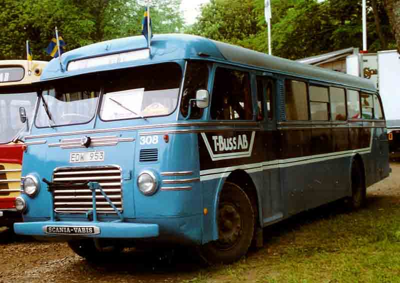 Scania-Vabis B62 Bus 1950.